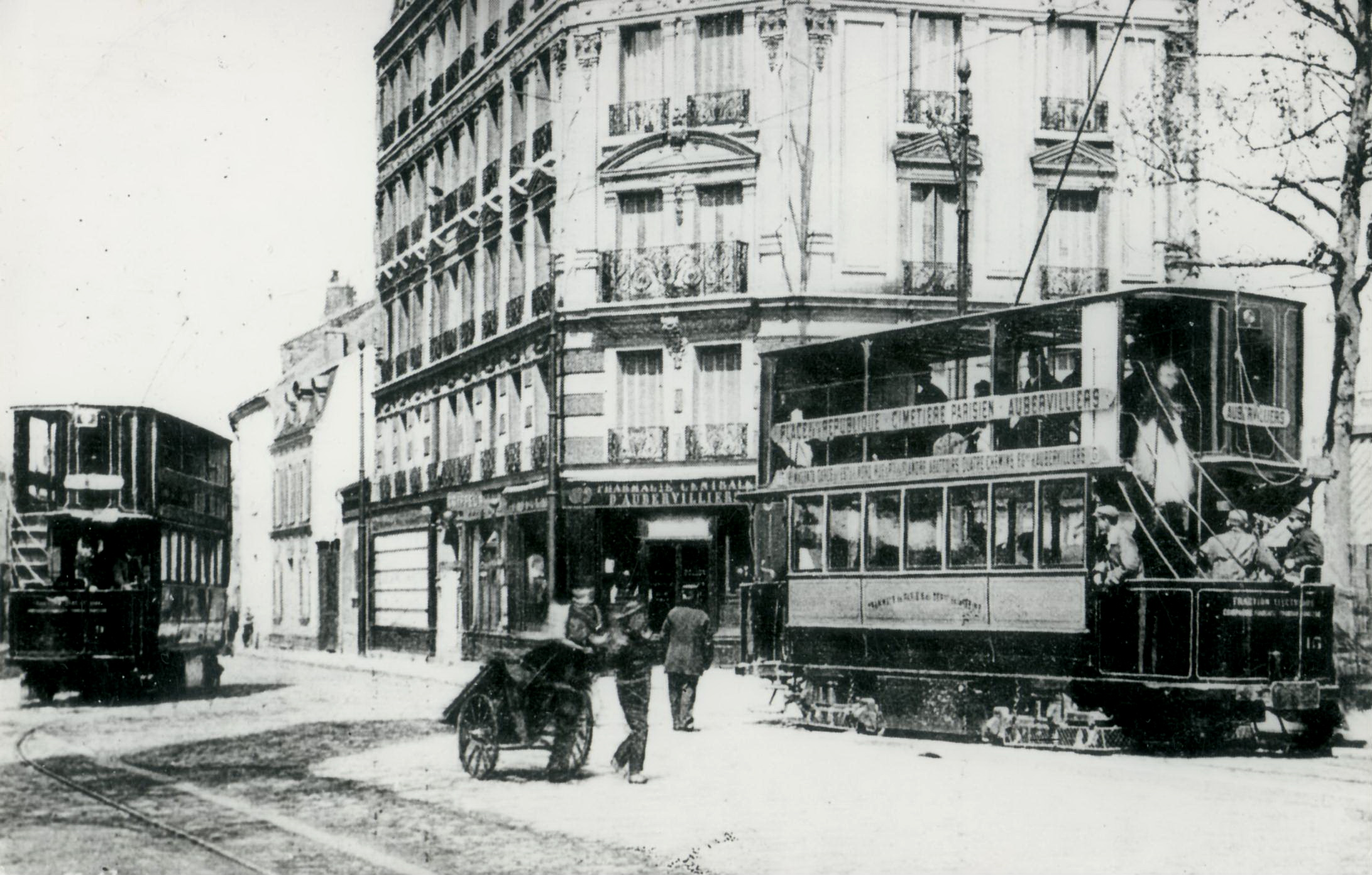 Photo d'un tramway de la TPDS à Aubervilliers, sur la ligne "Place de la République - Cimetière parisien - Aubervilliers"